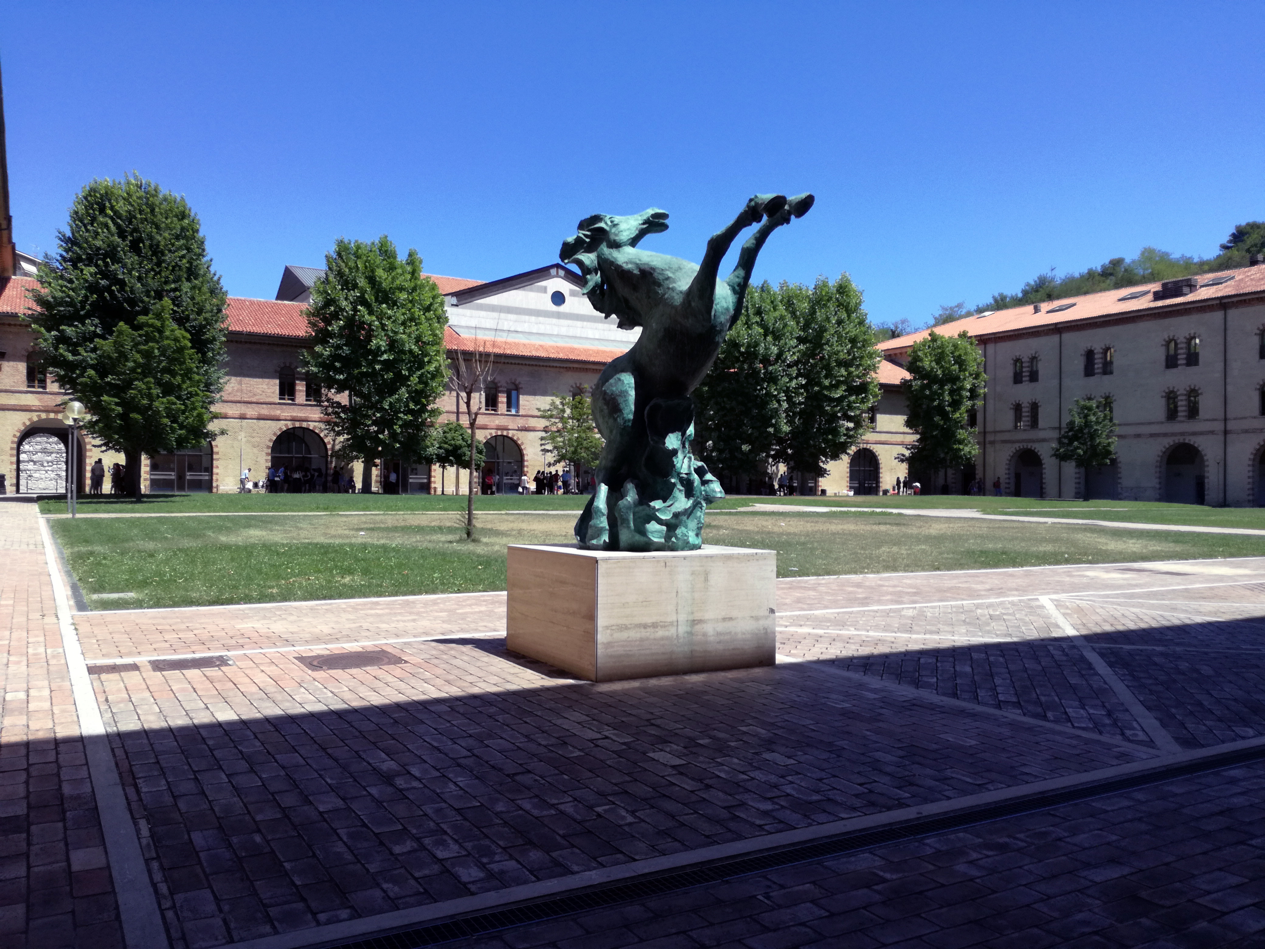 Portico della sede di economia (Villarey) dell'Università di Ancona